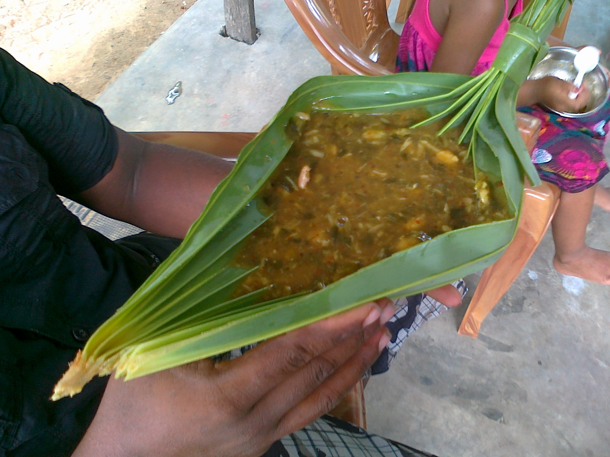 யாழ்ப்பாணத்து கூழ்